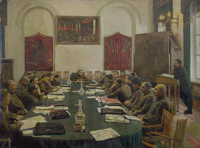 Исаак Бродский. Военно-революционный совет. 1925 год